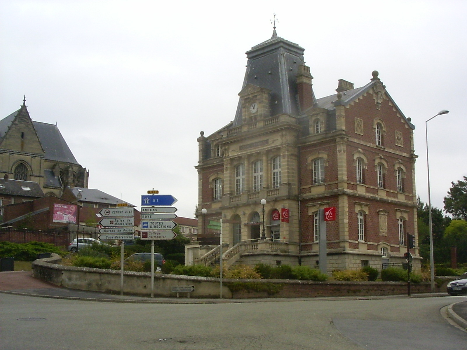 Montdidier, spaarbank